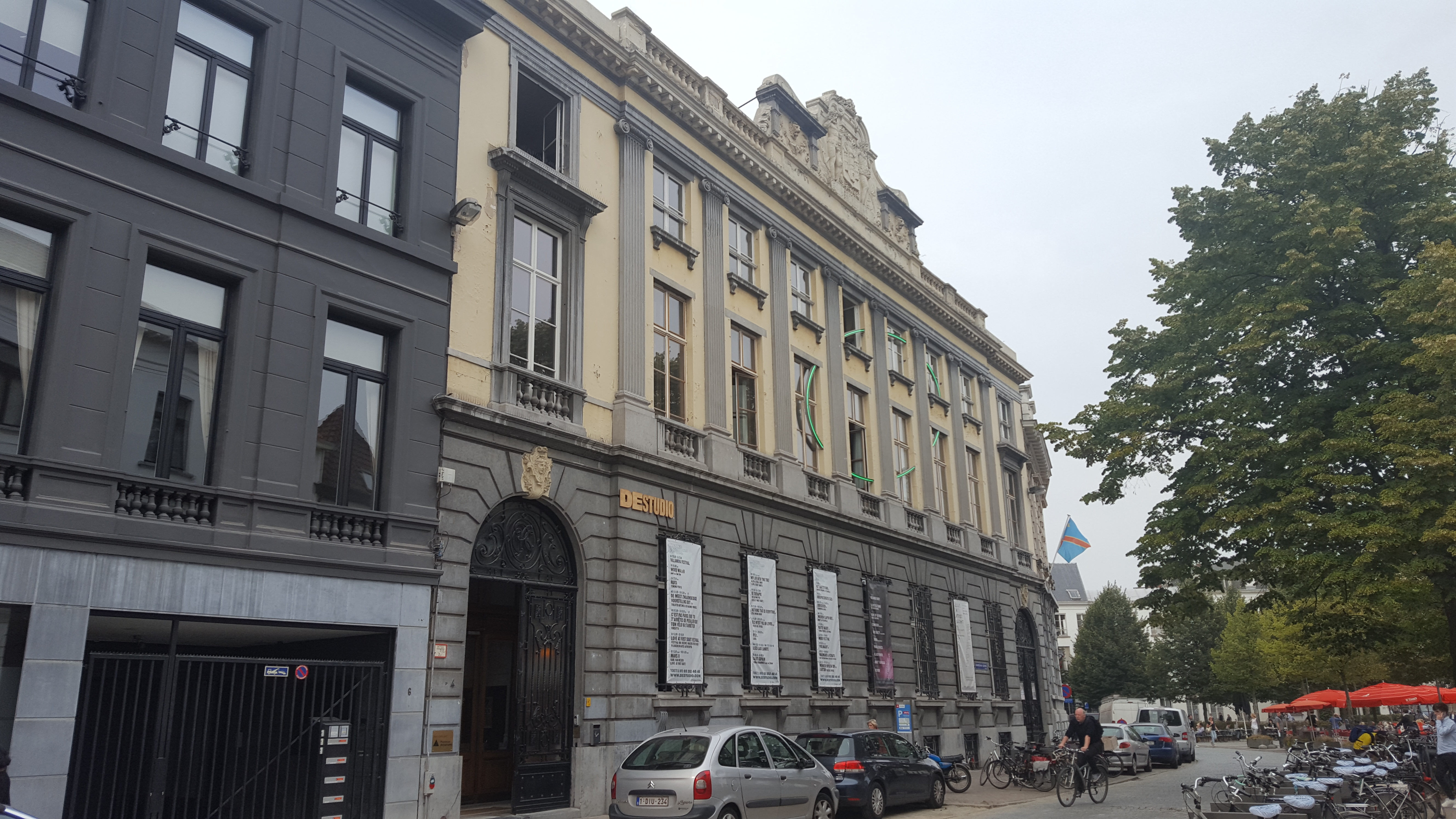 De Studio, Maarschalk Gerardstraat/Mechelseplein, Antwerpen, België